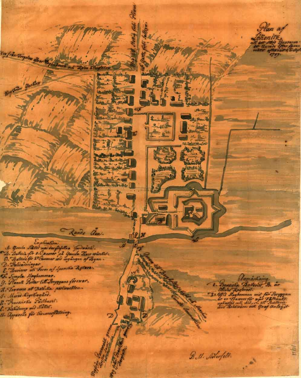 003 Plan af Lökenitz d.6.Sept.1759.